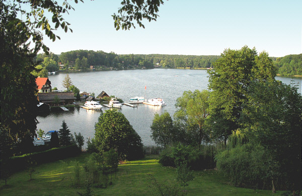 Der Schwarze See bei Flecken Zechlin nahe Rheinsberg in Brandenburg.